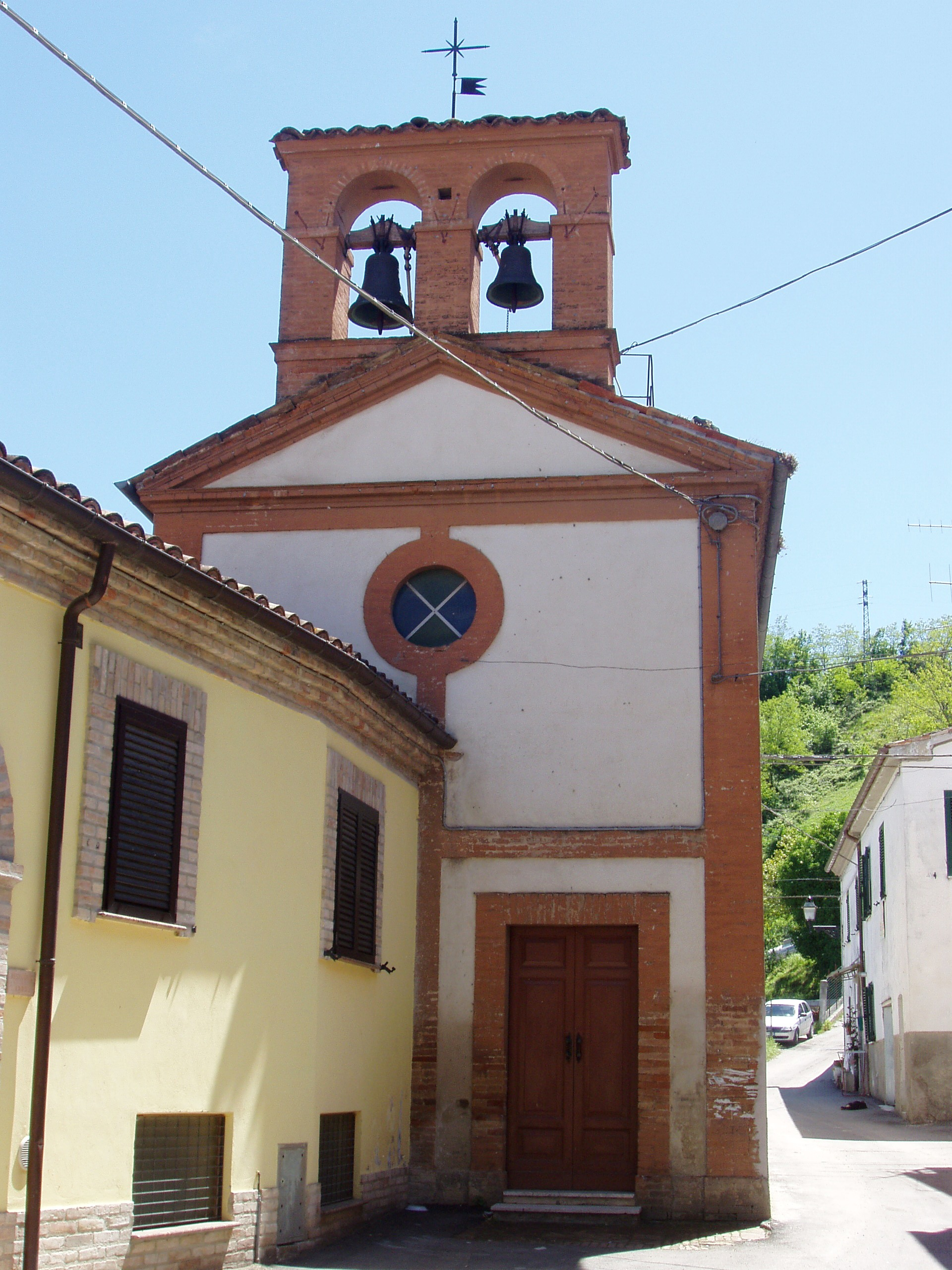 Lucio De Marcellis, foto personale, Chiesa parrocchiale di Rocciano, GFDL 2.5